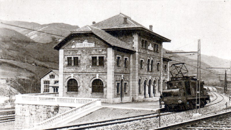 Locomotive Norte serie 6100 dans la rampe de Pajares